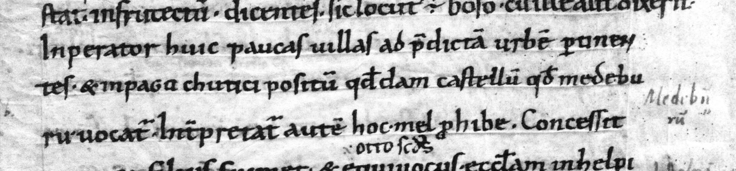 Stelle der Ersterwähnung Magdeborns in der Chronik des Thietmar von Merseburg Lateinischer Text: Inperator huic paucas villas ad predictam urbem pertinentes et in pago Chutici positum quoddam castellum, quod Medeburu vocatur - interpretatur autem hoc: mel prohibe -; Deutsche Übersetzung (J.C.M. Laurent 1848) Der Kaiser schenkte diesem Bischofe noch einige Dörfer, welche zu Merseburg gehörten, und eine Burg im Gau Chutici, Namens Medeburu [Magdeborn]; das soll bedeuten: Honig laß nicht durch!